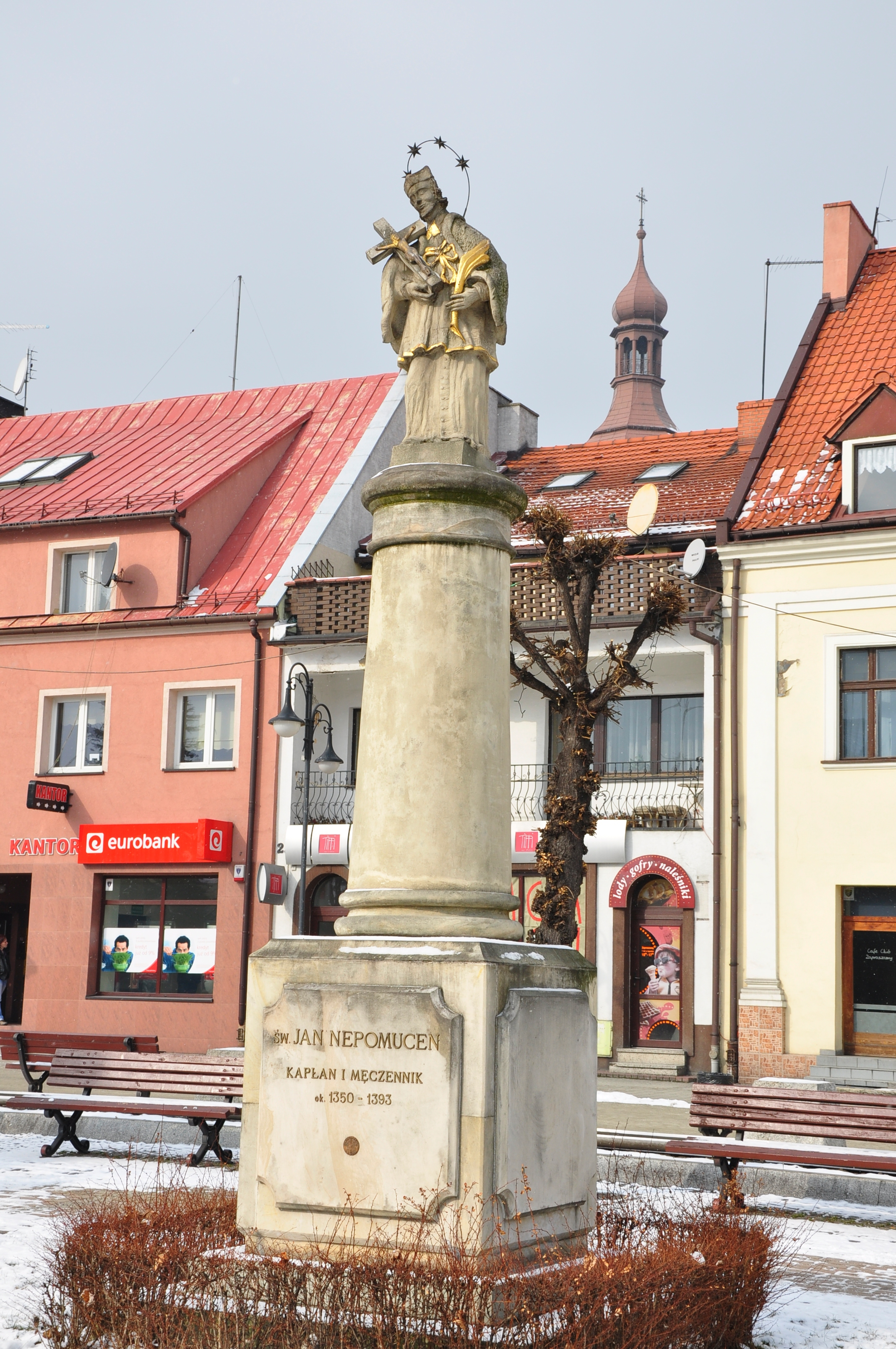 Pomnika św.Jana Nepomucena. Żory; Rynek.